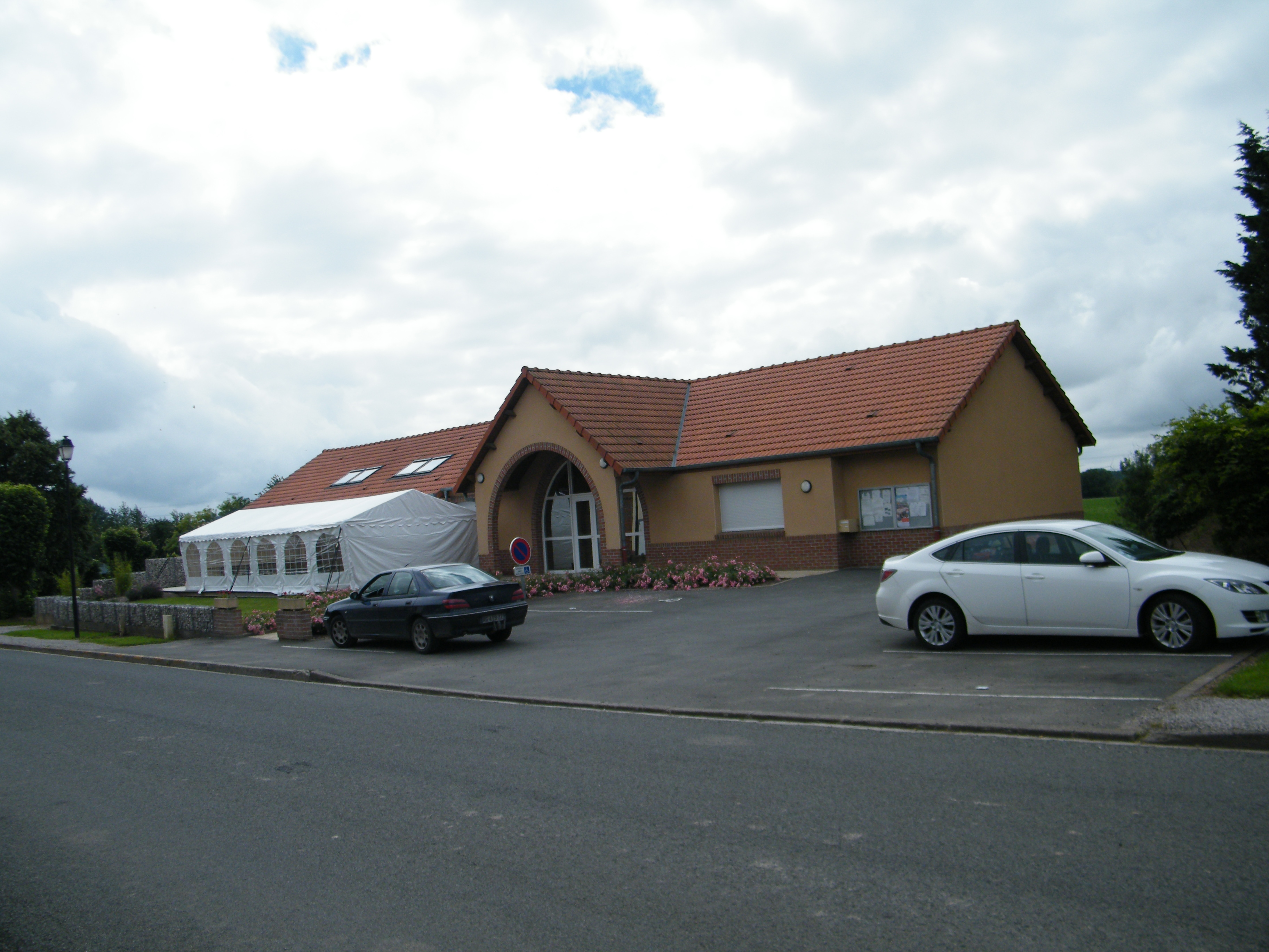 Salle communale.